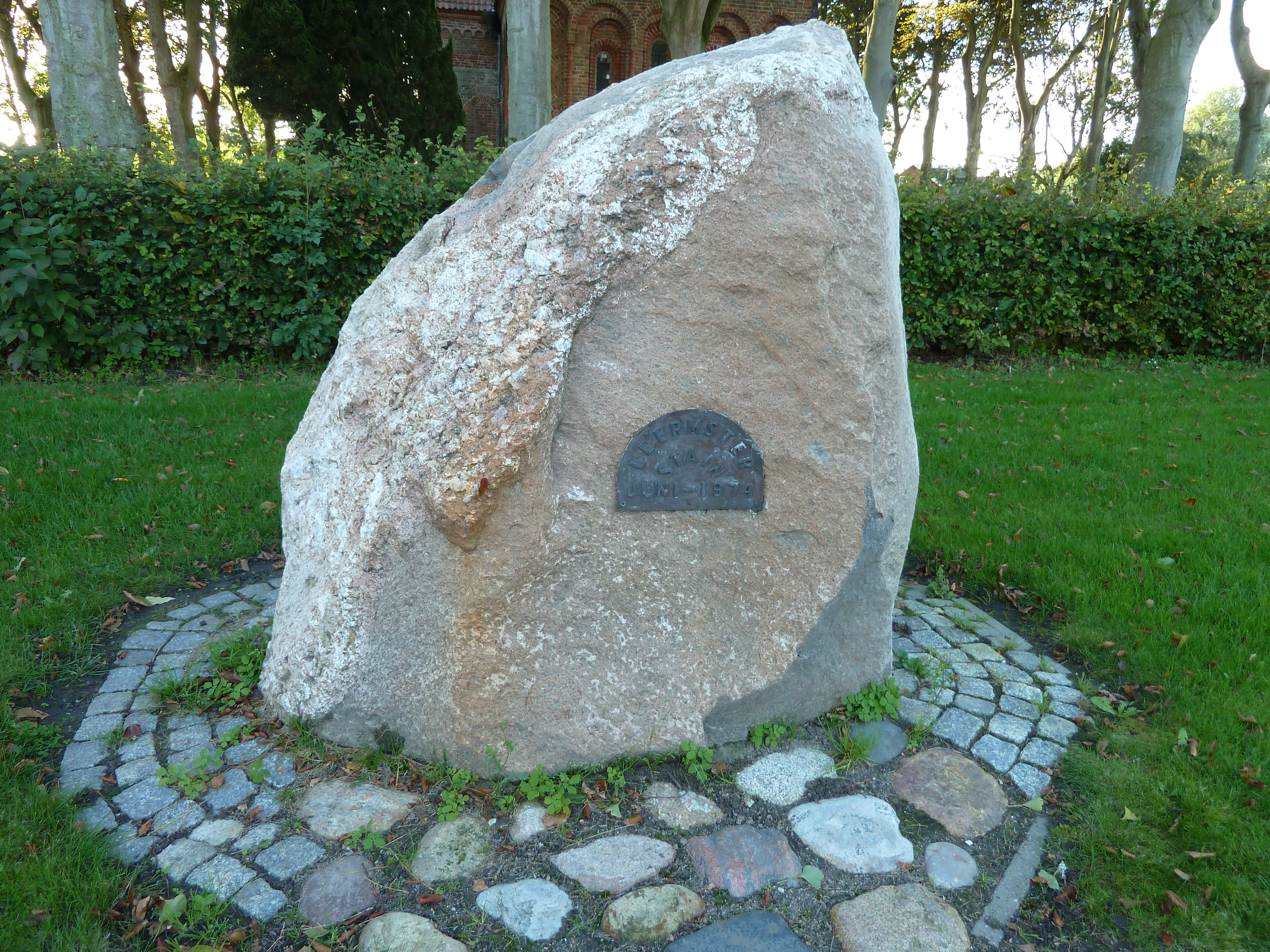 Leermster Stain (zwerfkei uit Rolde, in 1974 geplaatst) in Leermens.